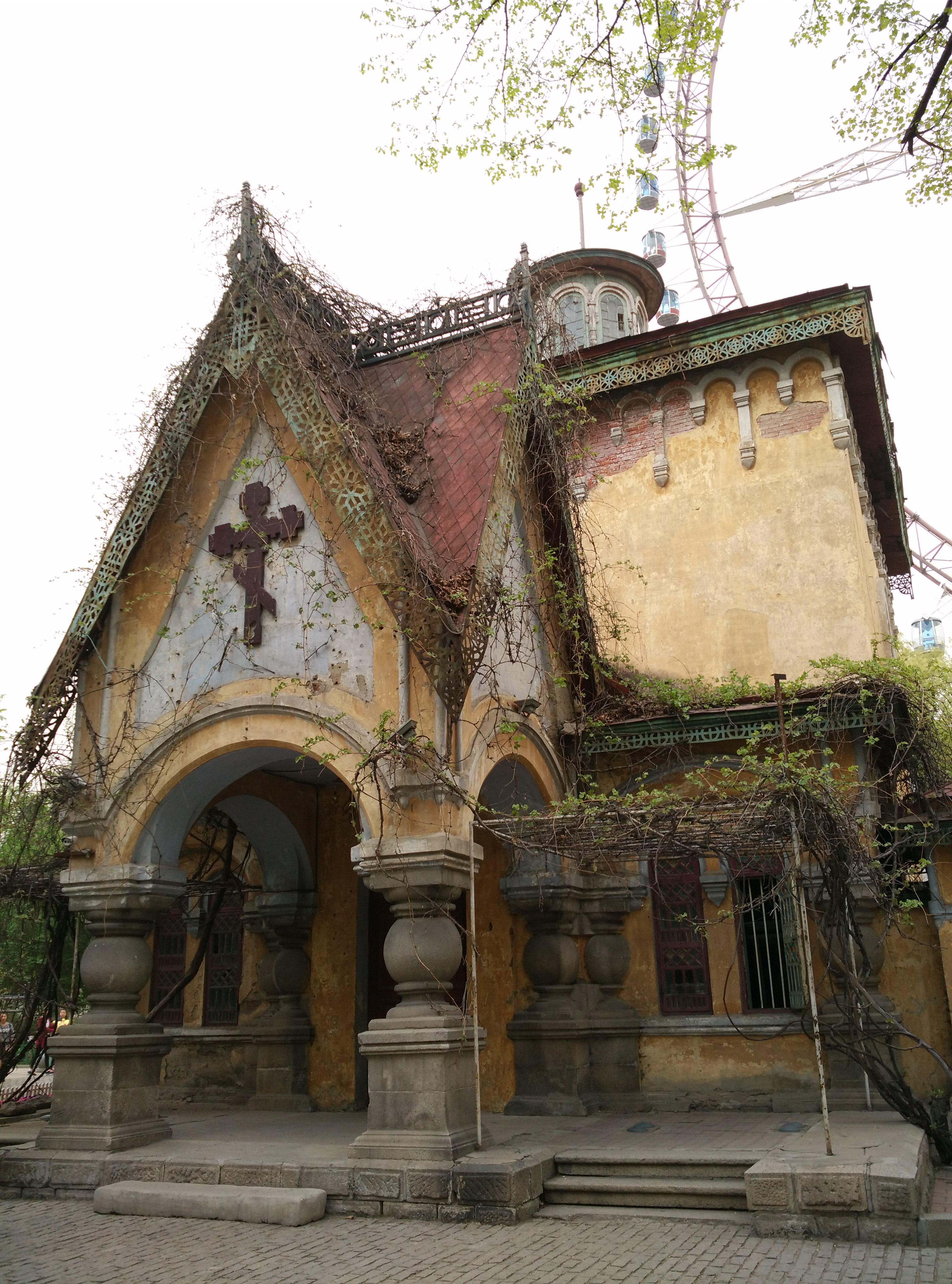 哈尔滨圣母安息教堂。已废弃。原为俄侨墓地东正教堂。现墓地已迁走，改建为游乐场。背景即为游乐场内的摩天轮